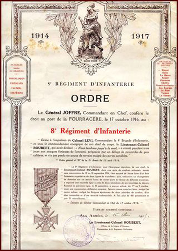 document militaire